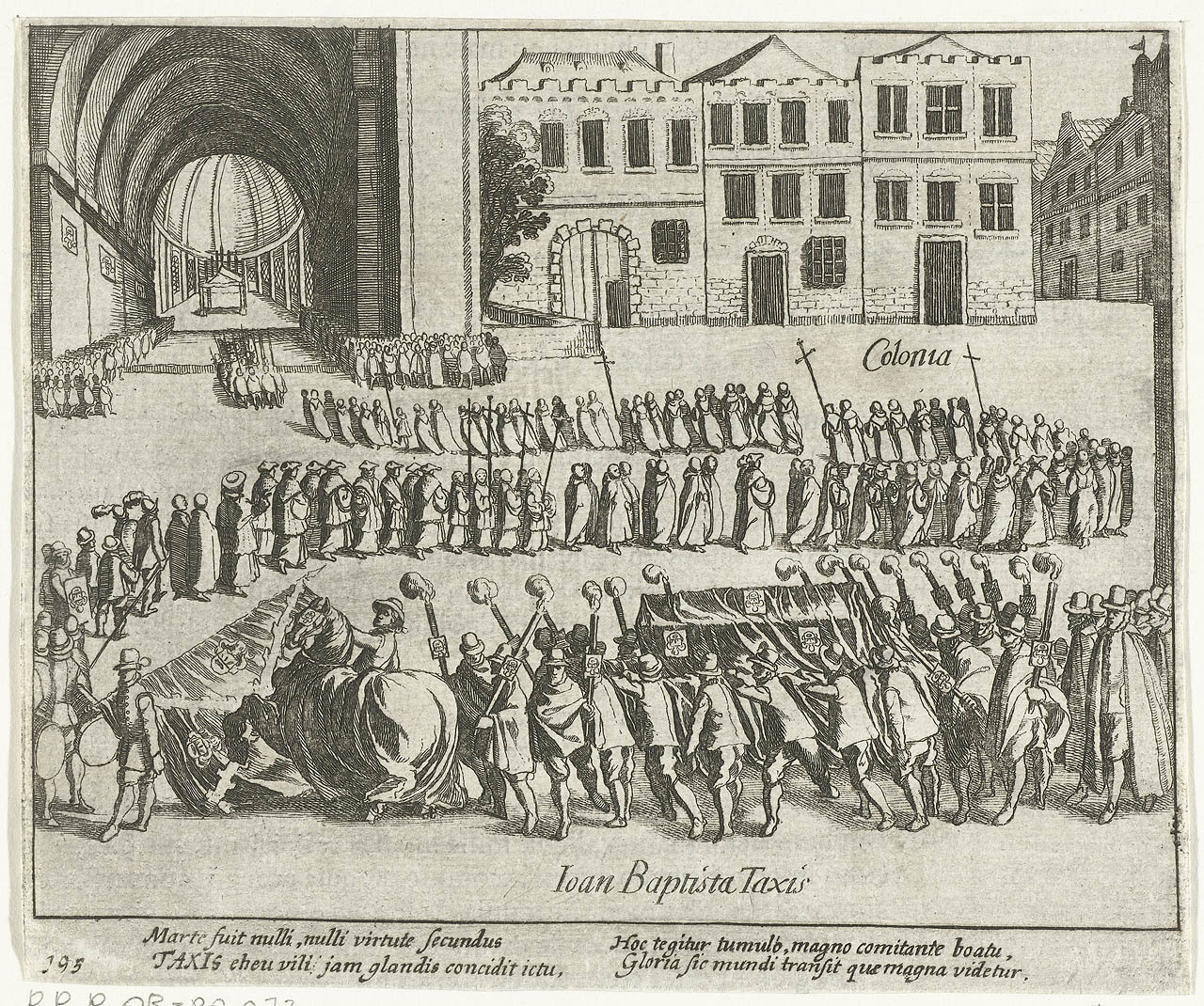 Grablege von van Taxis